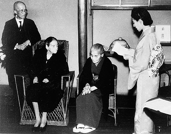 同窓会主催デントン80歳の祝会（デントンハウスにて）左より牧野虎次総長、デントン、星名ヒサ、祝詞を述べる武間冨貴同窓会会長